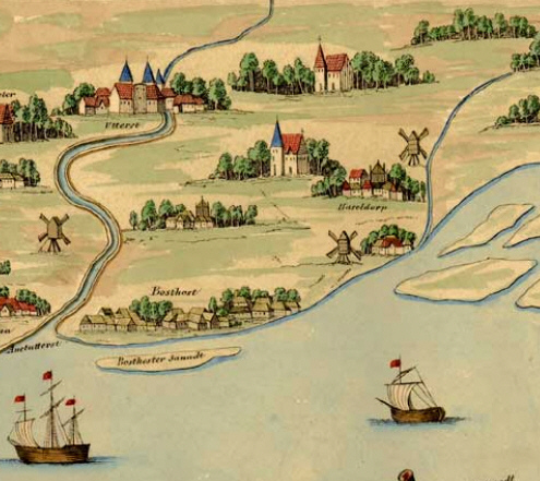 Uetersen, Ausschnitt aus der Elbkarte von Melchior Lorichs aus dem Jahr 1568